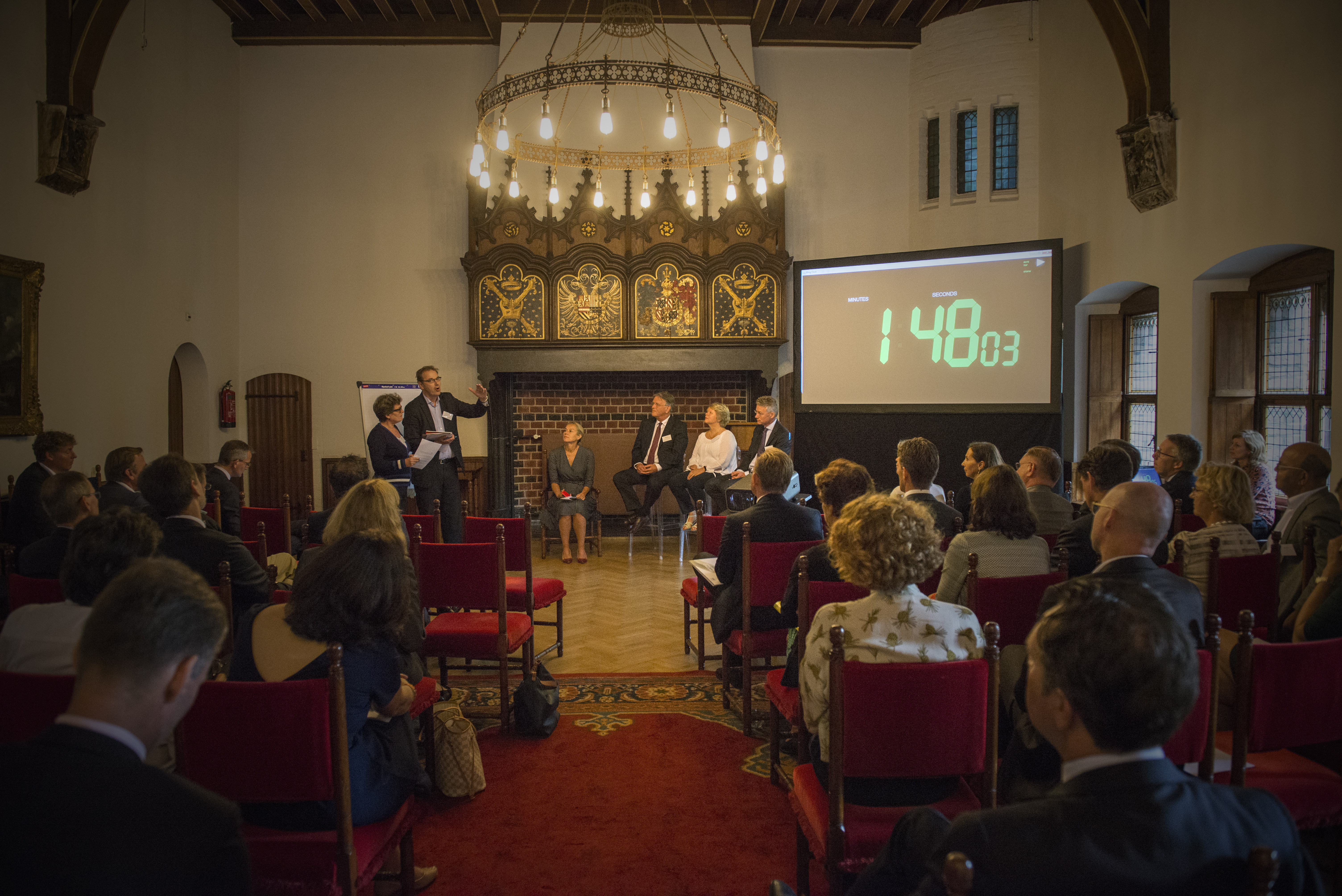 Foto's: BZ | Aad Meijer Bijna 50 leidinggevenden en experts van internationale organisaties, zoals de Wereldbank, het Internationaal Strafhof, de World Trade Organisation en diverse VN-onderdelen kwamen donderdag naar Touch Dutch Base: de eerste terugkomdag voor Nederlanders in internationale topbanen. Minister Koenders greep zijn welkomstspeech aan voor een oproep. Om jonge goede Nederlanders te coachen. Om elkaar te helpen. En om vrouwen op hoge posities te helpen komen. Want ondanks het succes van dagvoorzitter Sigrid Kaag en 16 andere aanwezige topvrouwen moet er nog veel gedaan worden, aldus de minister. Maar wat? Die vraag stond prominent op het programma.